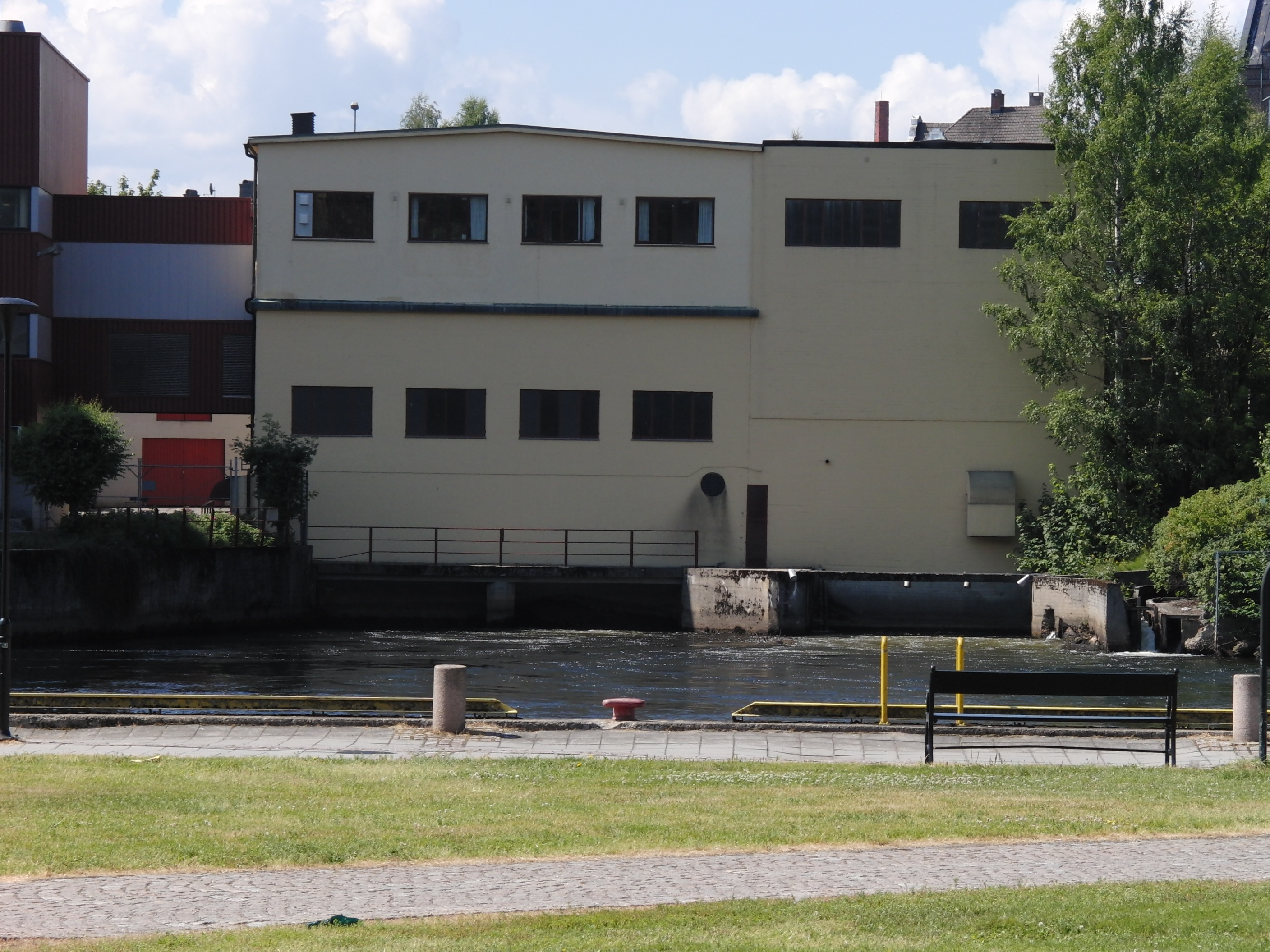 Eidet kraftverk